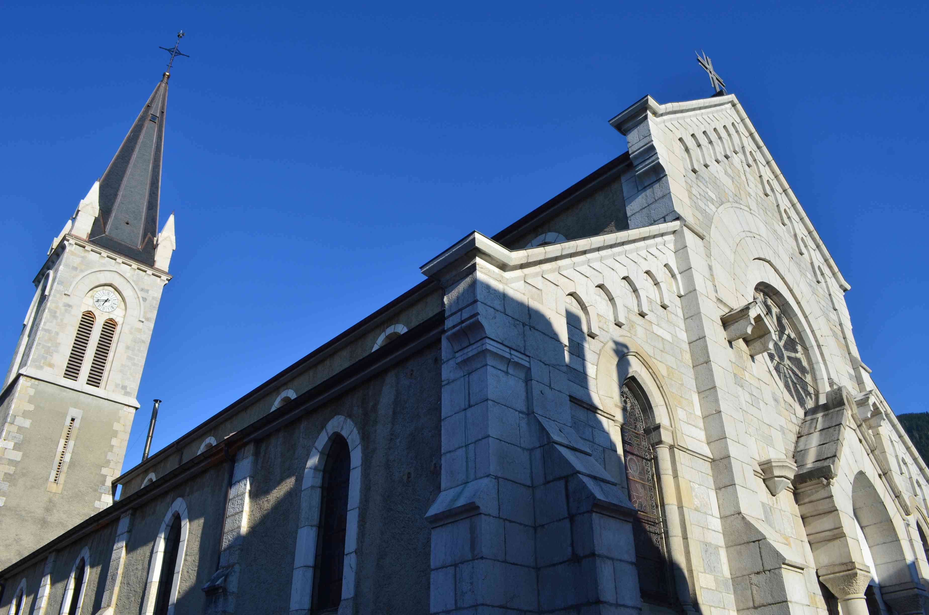 Eglise de Thorens